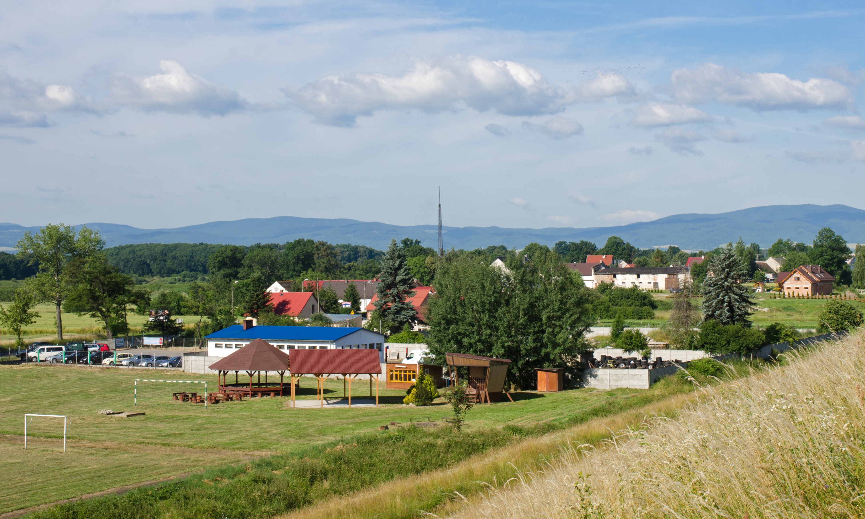 Ścibórz